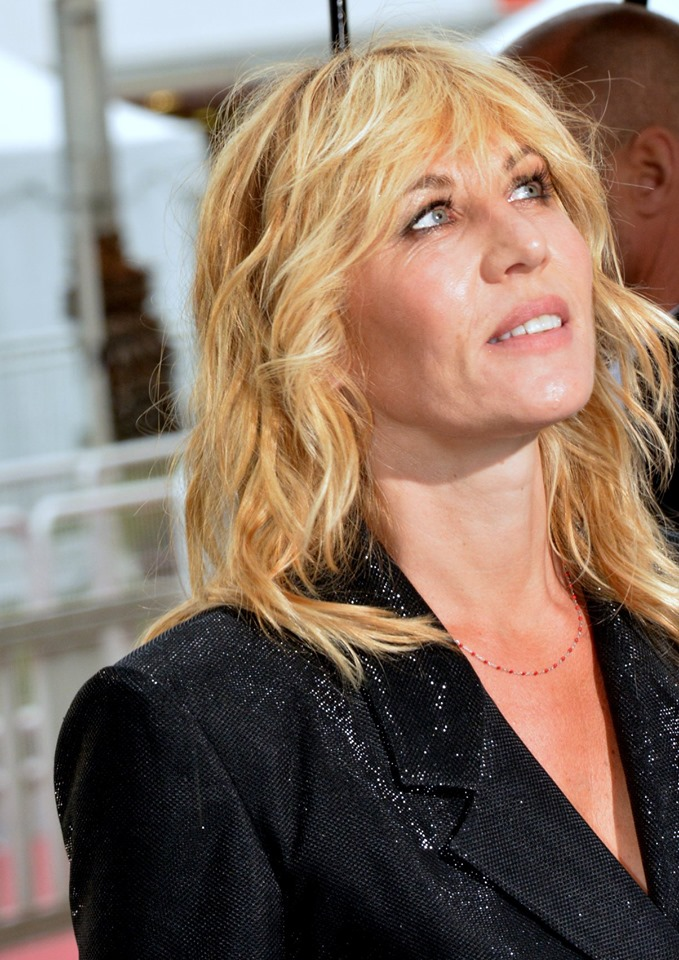 Mathilde Seigner au Festival de Cannes 2019.